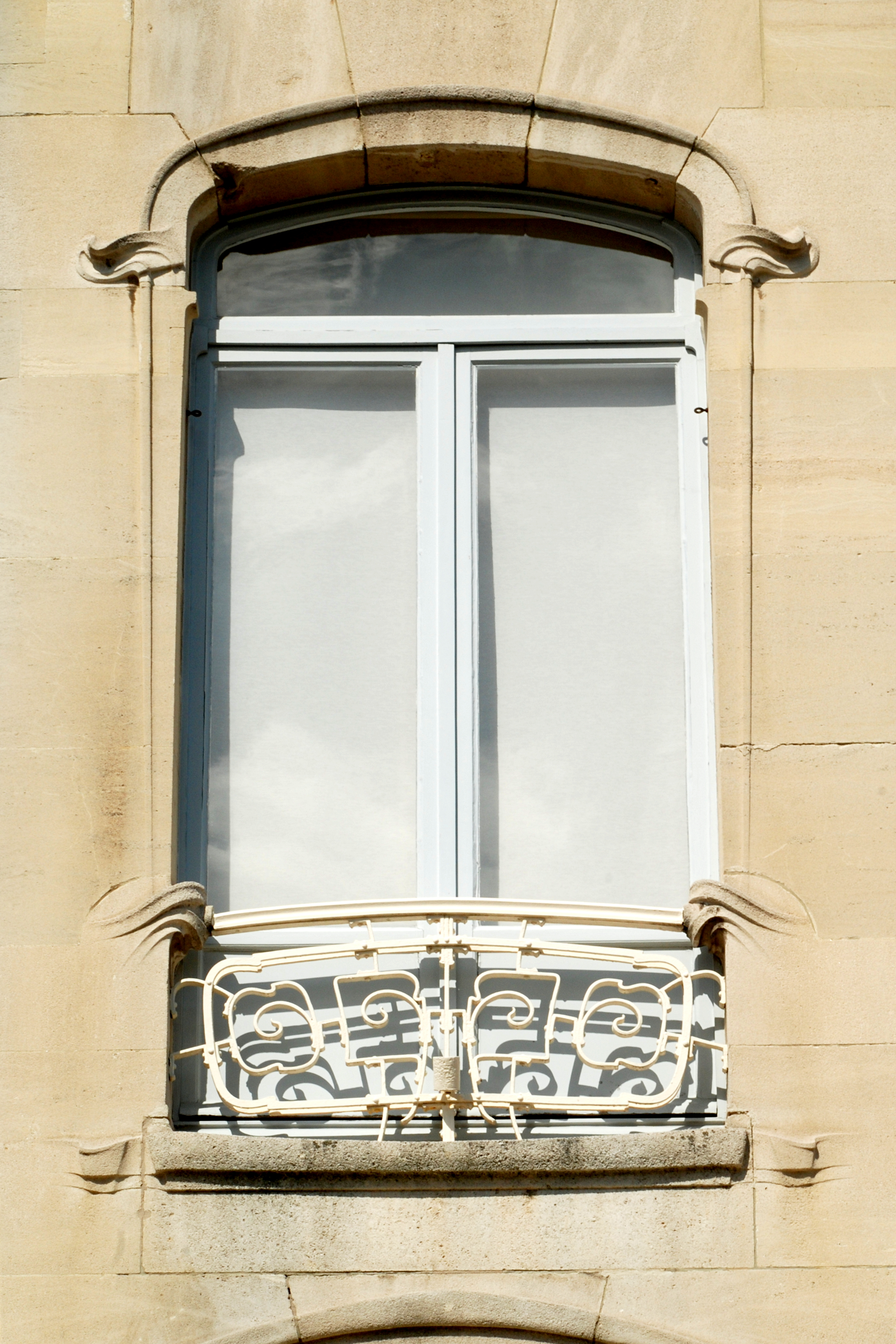 Belgique - Bruxelles - Hôtel Van Eetvelde (Art nouveau - Victor Horta - 1895)